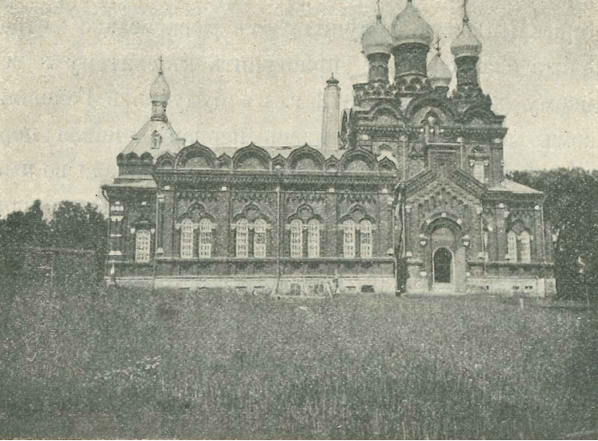 Троицкий собор Казанского Головинского монастыря в 1912 году